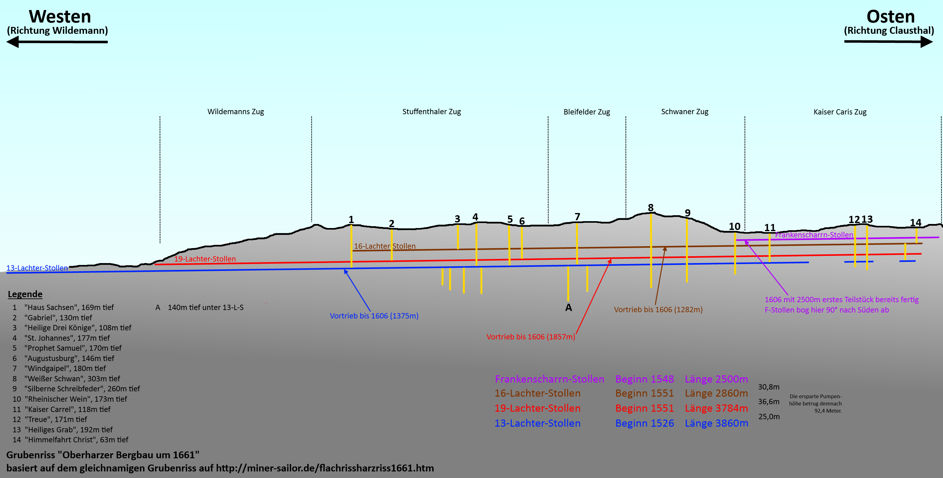 Selbsterstellter Grubenriss der Bergwerke zwischen Wildemann und Clausthal im Jahr 1661. Basiert auf dem Grubenriss unter